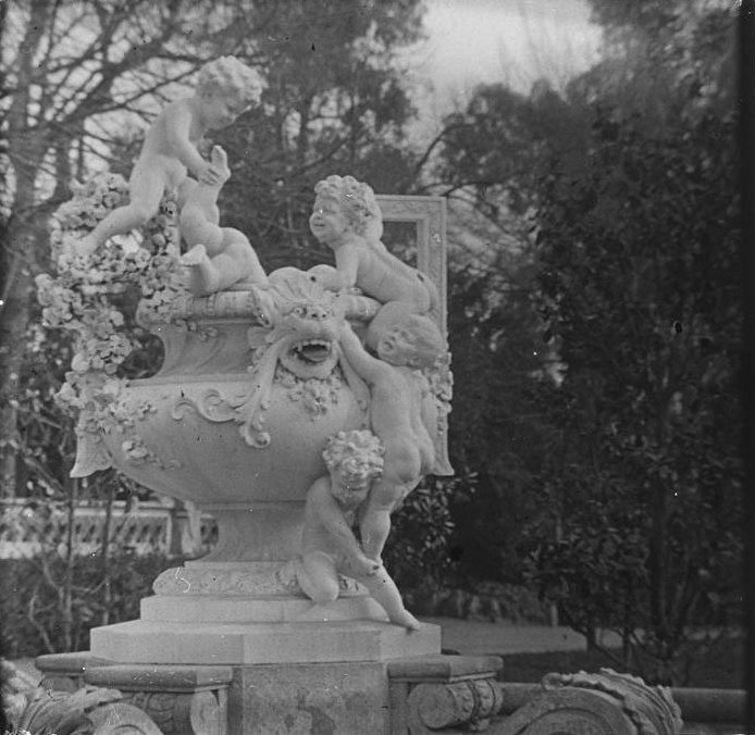 Fotografia de la Font dels Nens al Parc de la Ciutadella de Barcelona feta per Josep Salvany (1924)